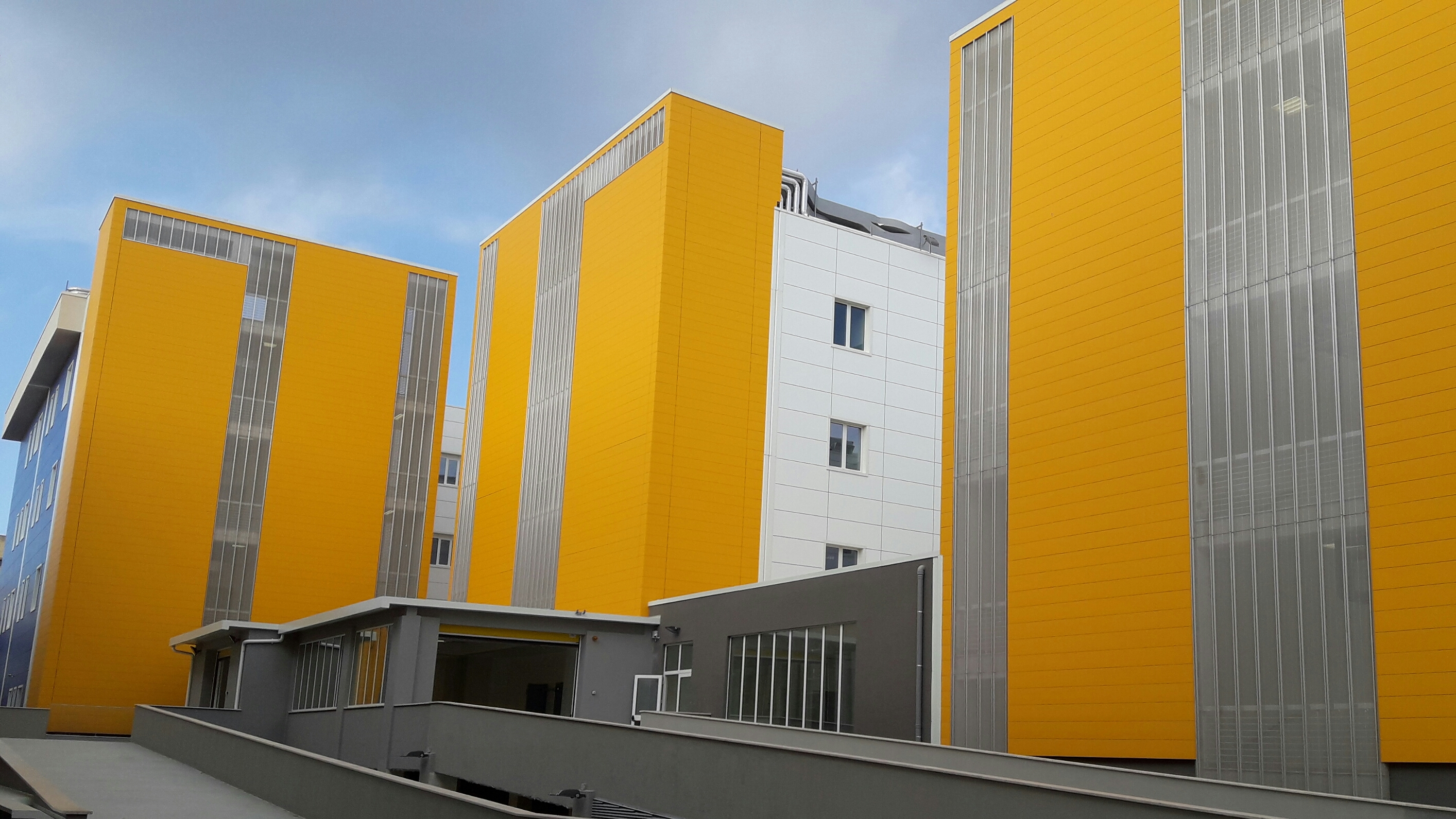 Il nuovo ospedale Abele Ajello di Mazara del Vallo. Ingresso Pronto soccorso